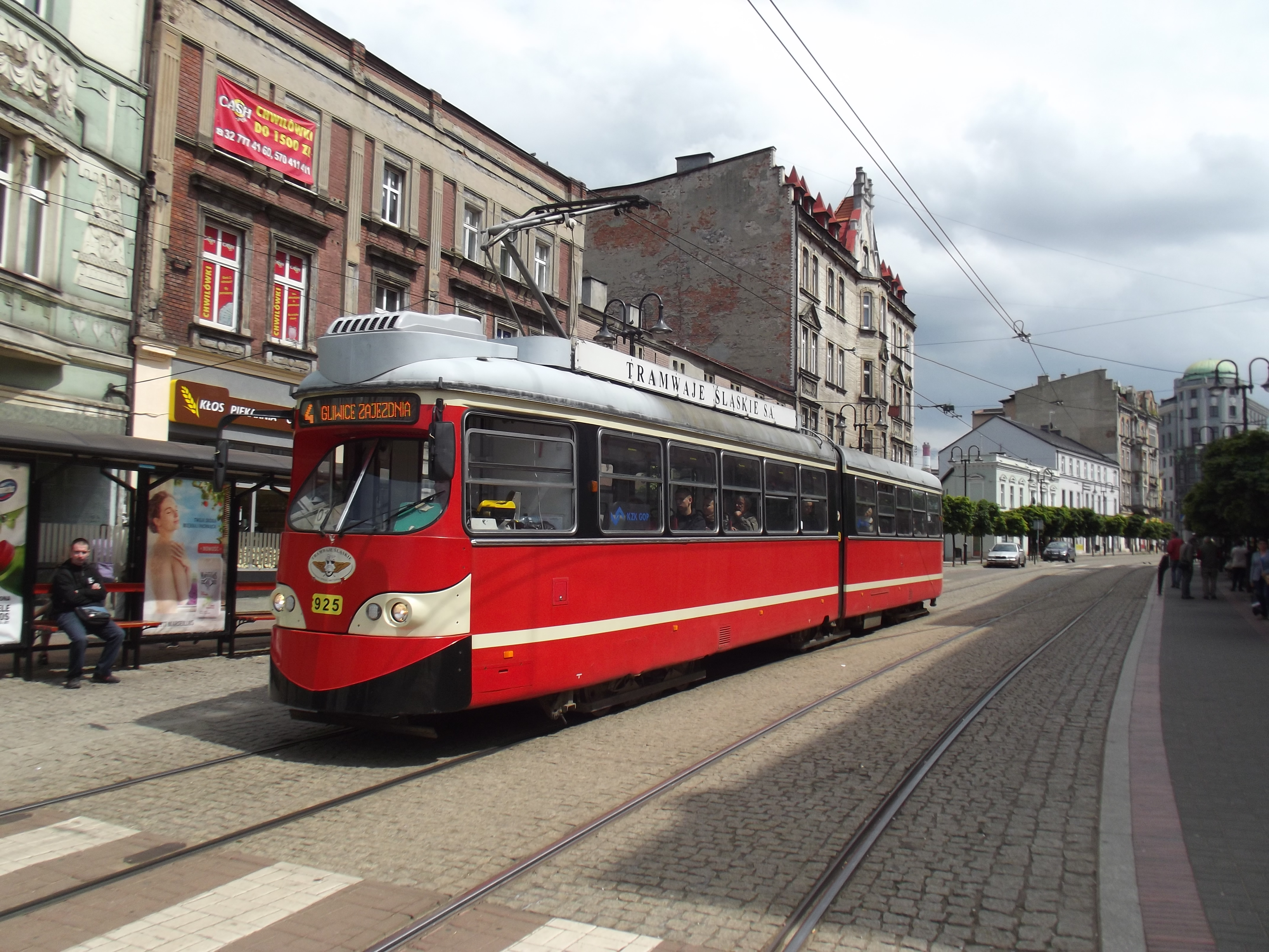 Tramlijn 4 in Zabrze